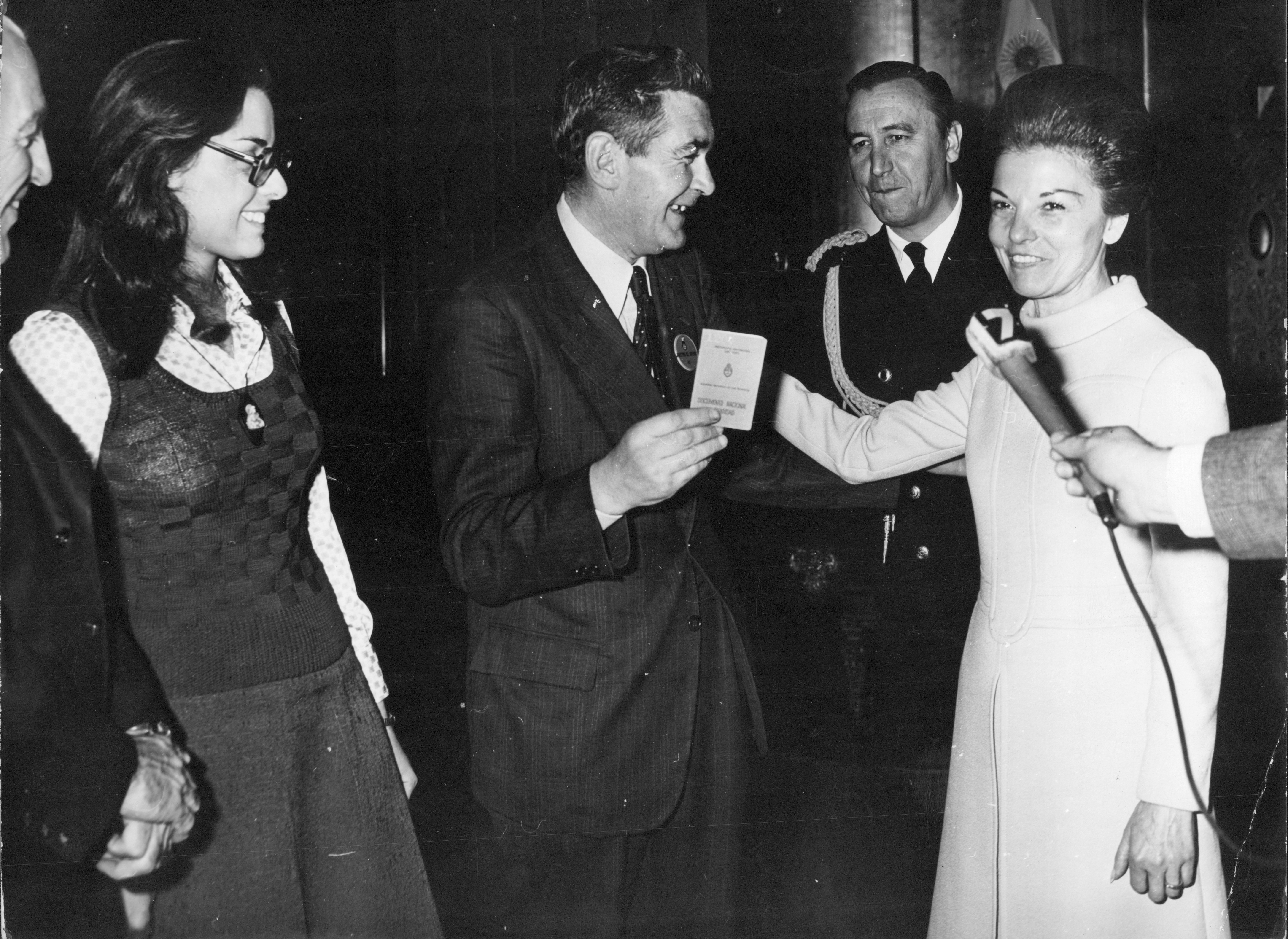 La Presidente María Estela Martínez de Perón entregando su documento nacional de identidad argentino al Sr. Pedro Mc. Leod, nacido en las Islas Malvinas. AGN Documento Fotográfico.